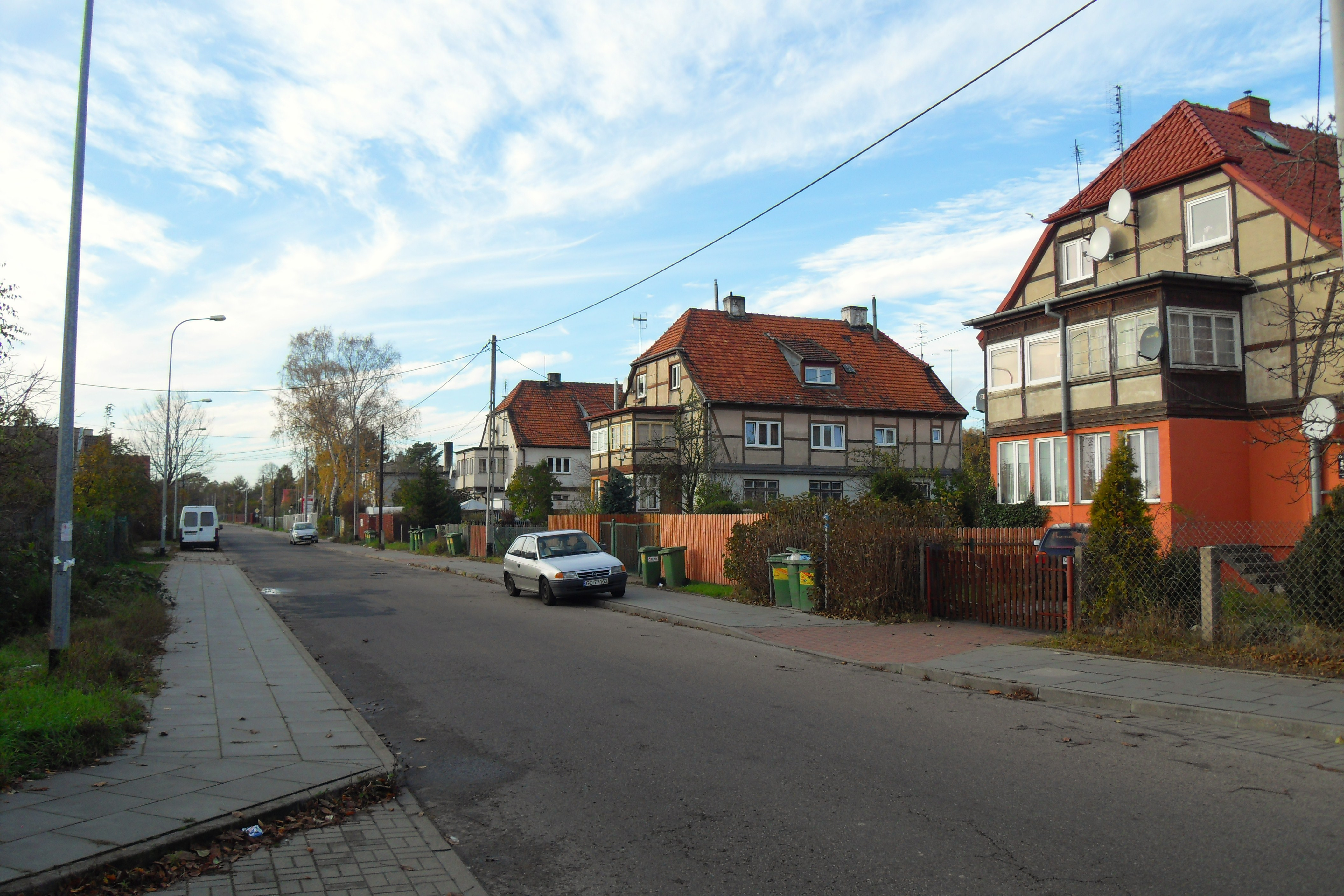 Gdańsk Krakowiec, ul. Jodłowa.